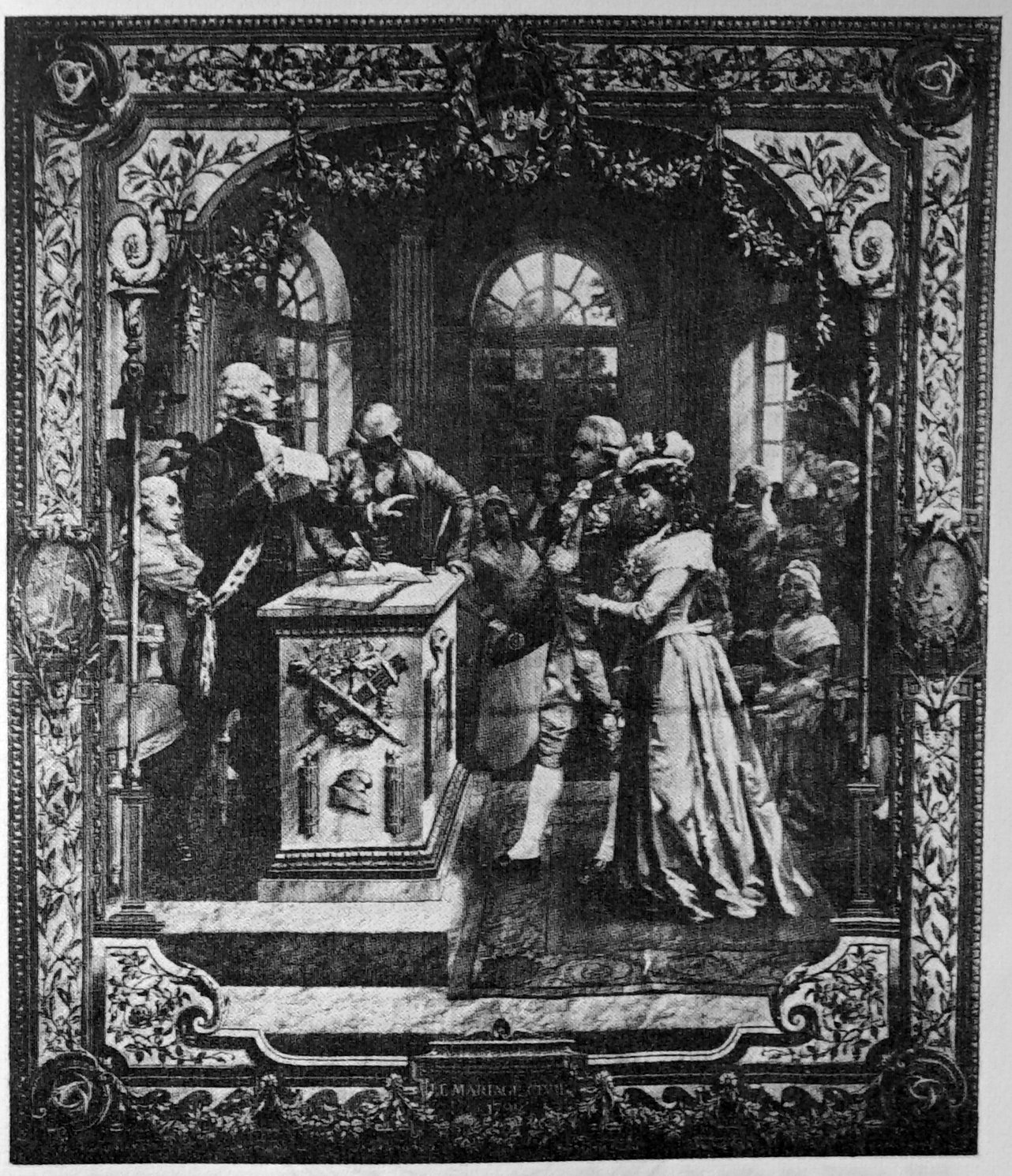 situé en l'hotel de ville de bordeaux sur un carton provenant du musée de Reims.